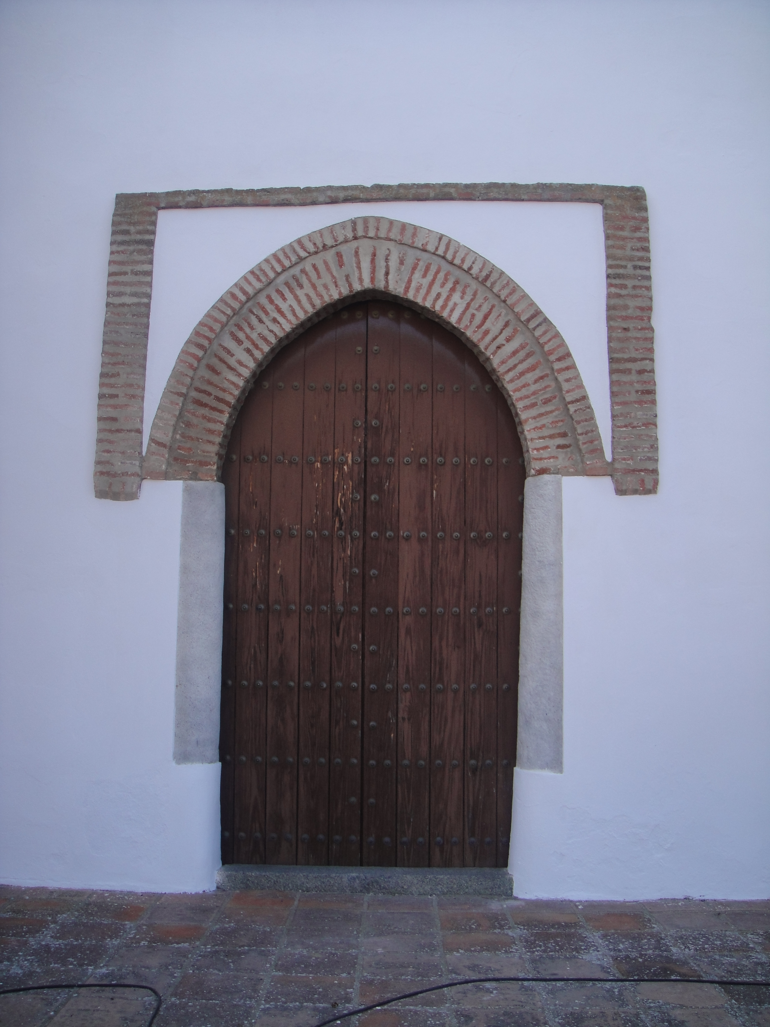 Puerta de la iglesia de Nuestra Señora del Castillo de Fuente Obejuna, provincia de Córdoba, (España).